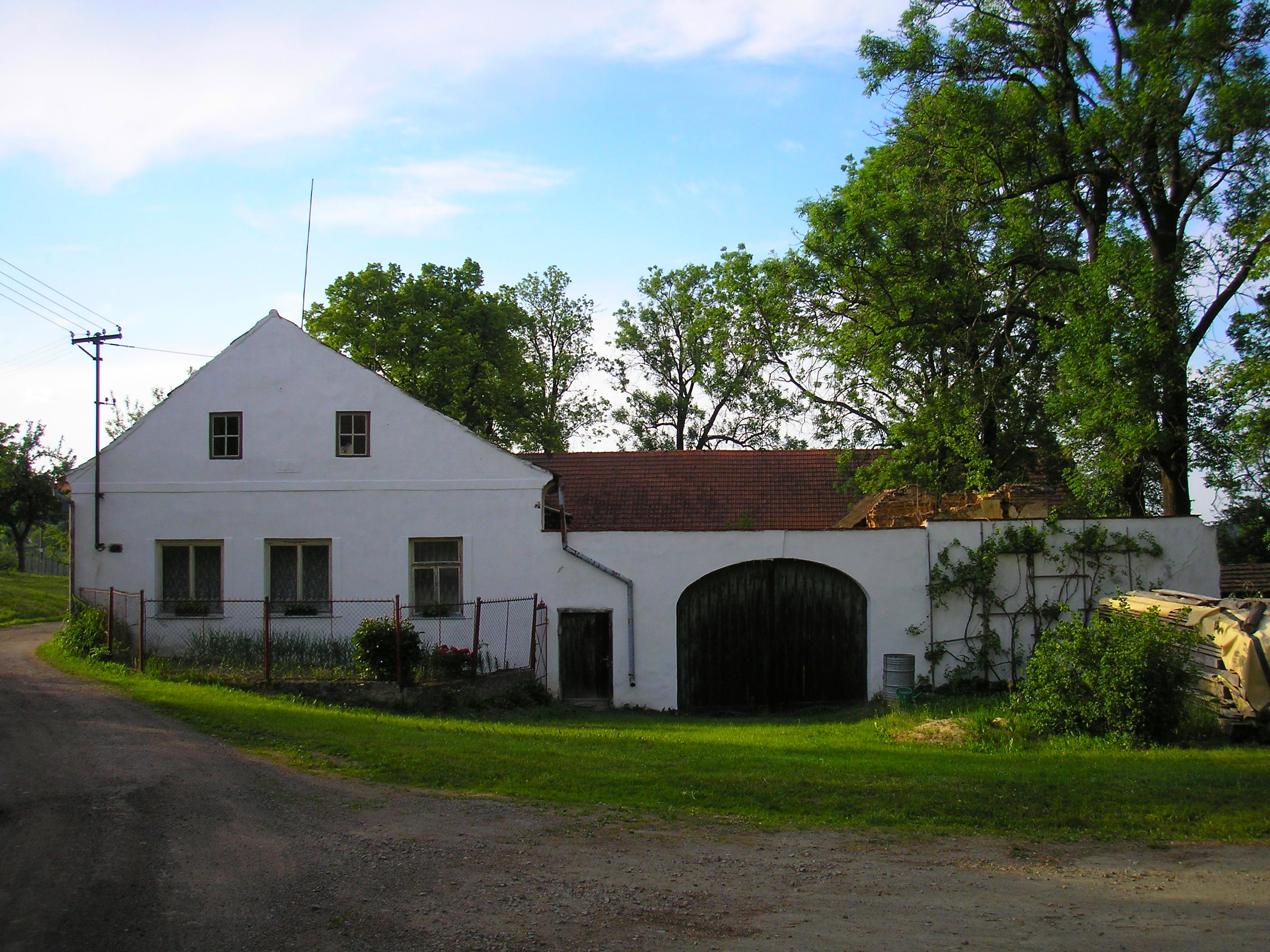 Horní Vesce je osada, část obce Římov v okrese České Budějovice